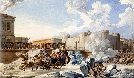 К. Ф. Кнаппе. Мойка у Тюремного замка. 1789